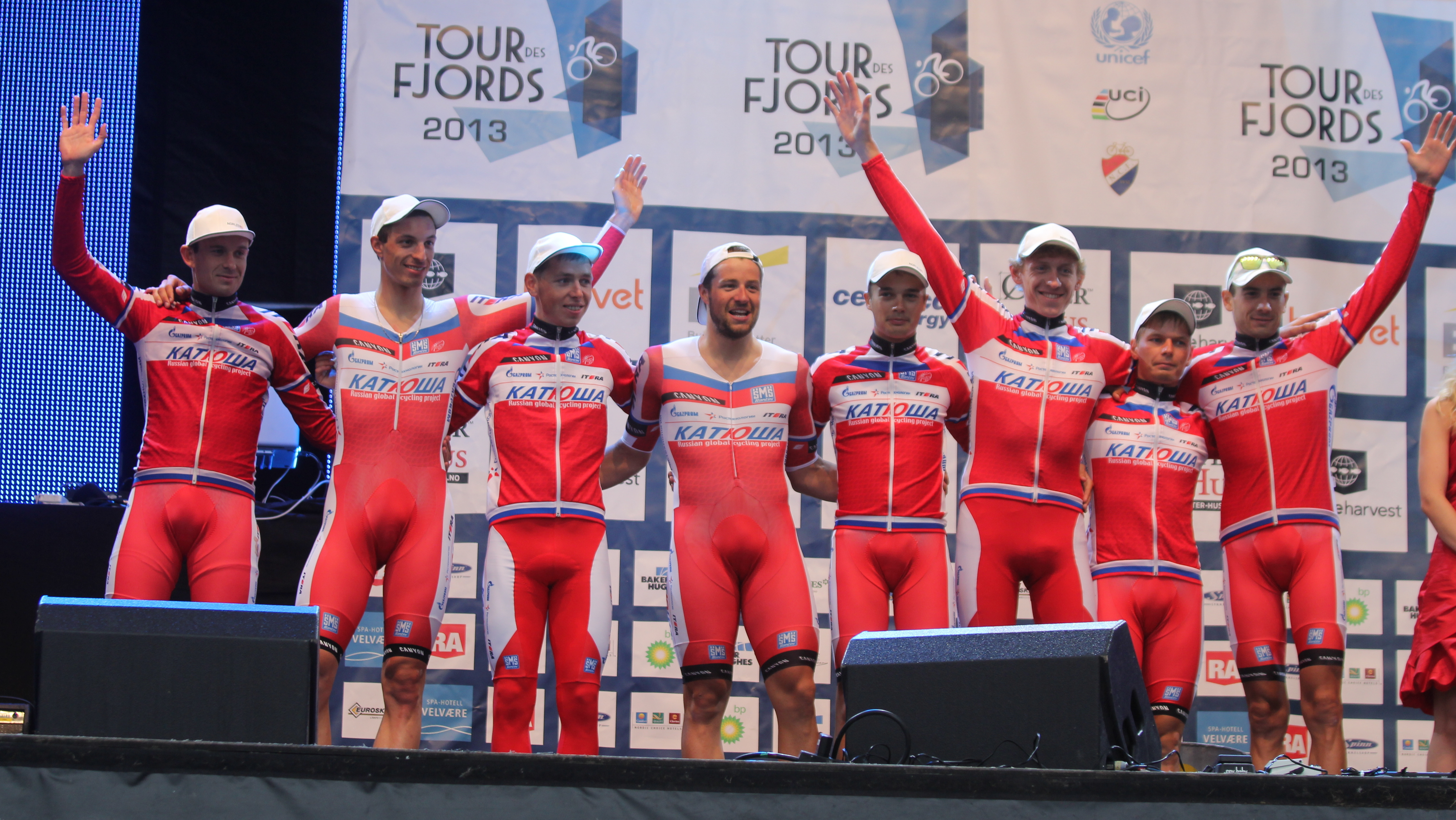 Katusha Team winner Tour des Fjords 2013 and winner Stage 3 (TTT)